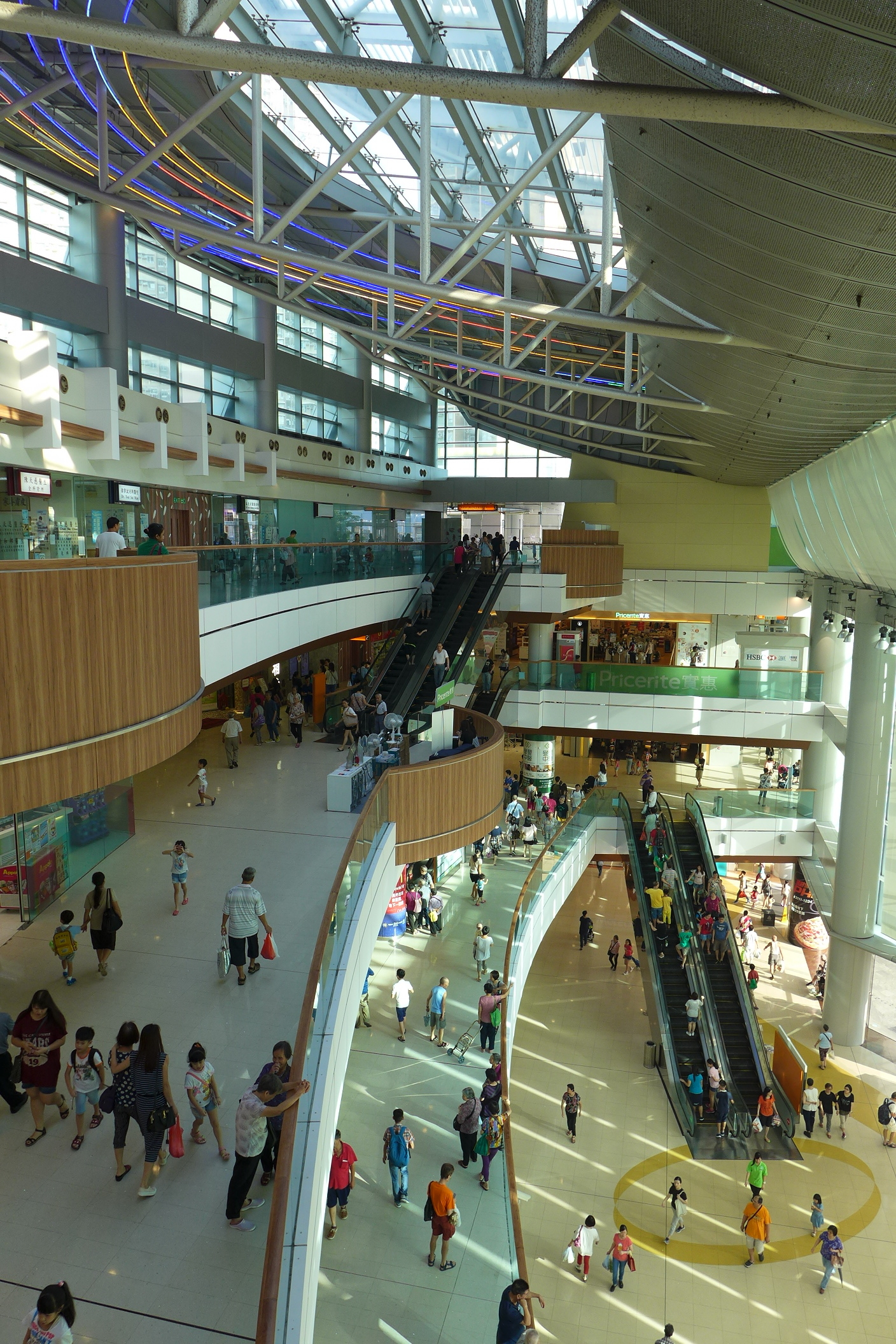 Sau Mau Ping Shopping Centre Atrium